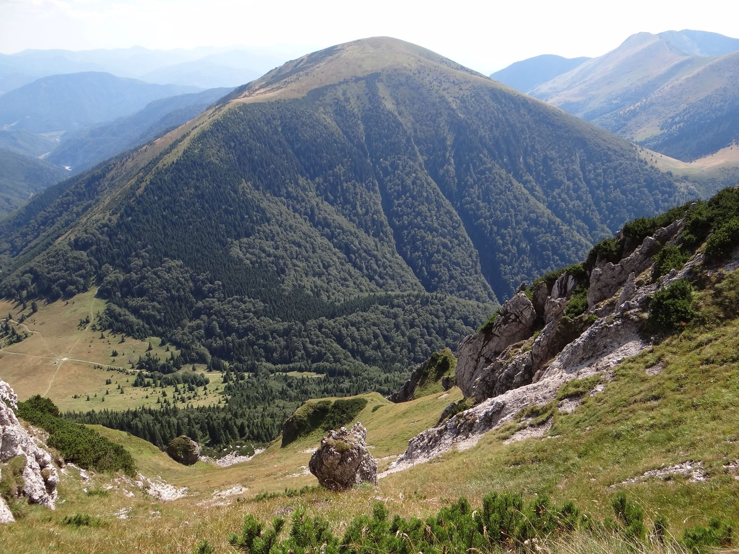 Stoh View from Veľky Rozsutec